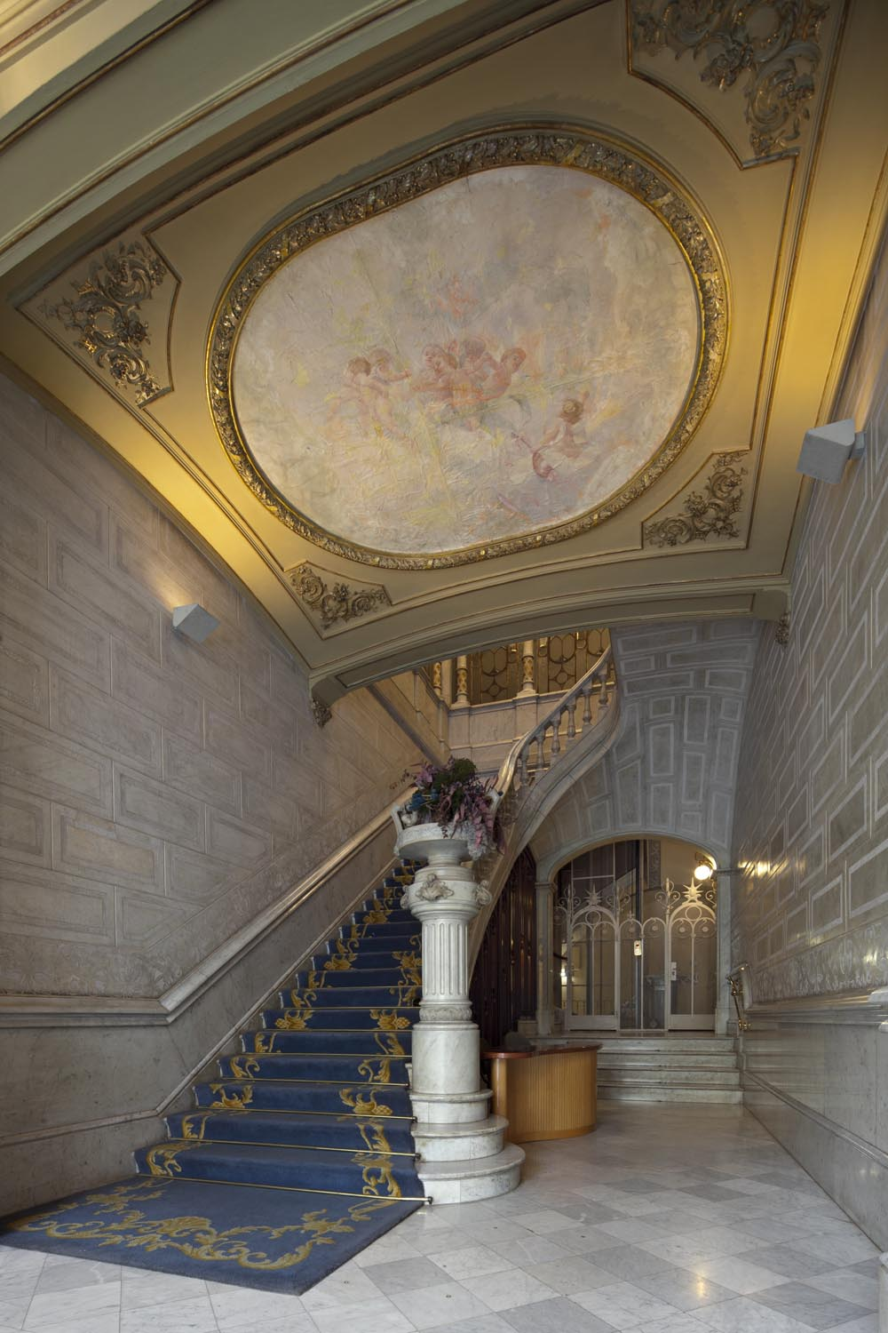 Vestíbul de la Casa Malagrida